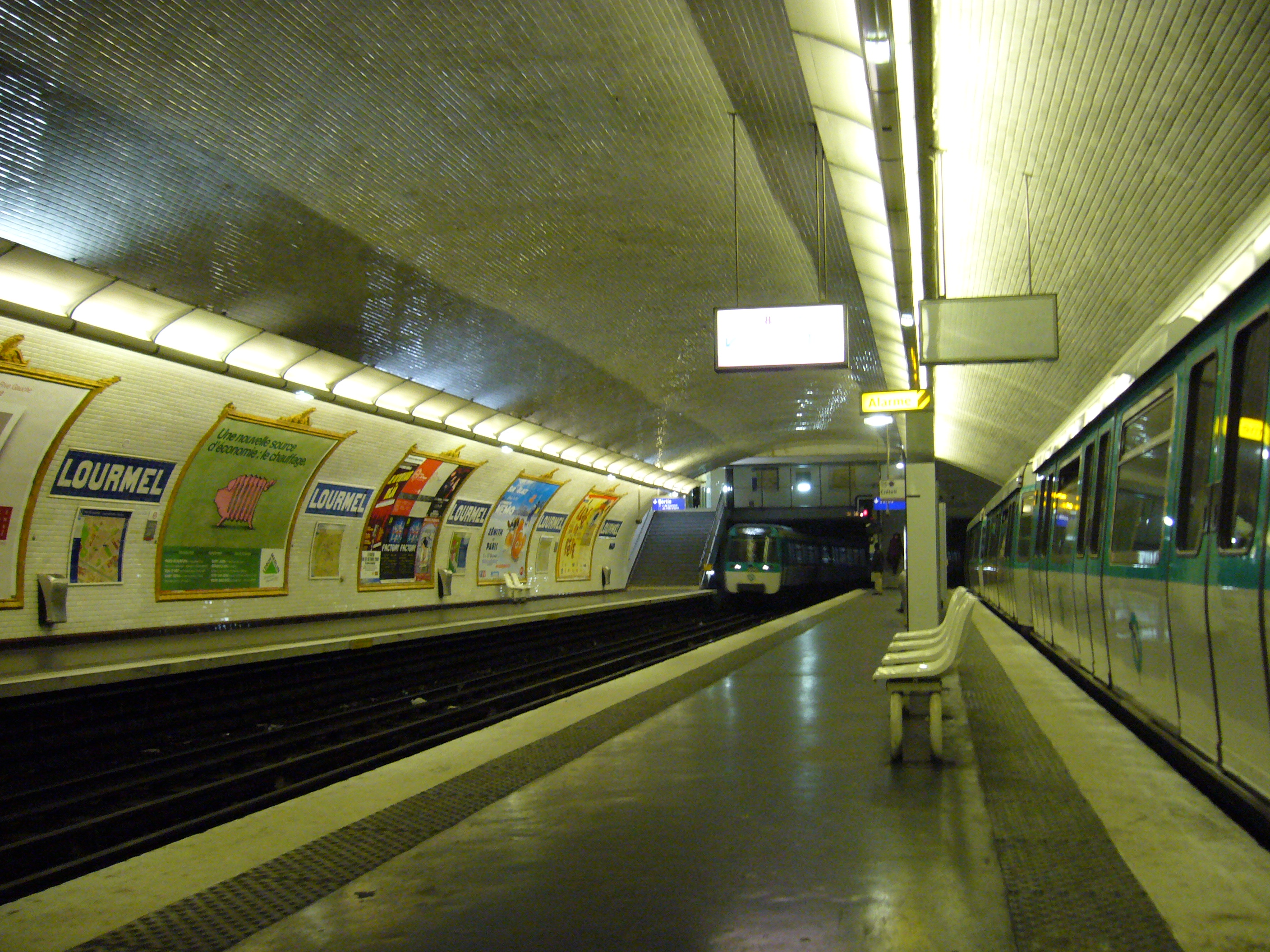 Vue de l'entrée en gare d'un MF77 à la station Lourmel sur la ligne 8 du métro de Paris.